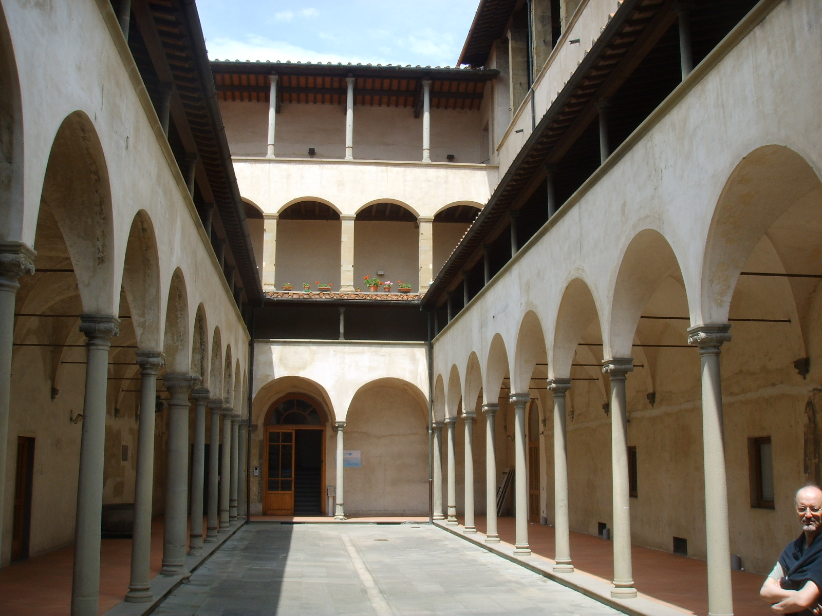 Ospedale degli innocenti, chiostro delle donne